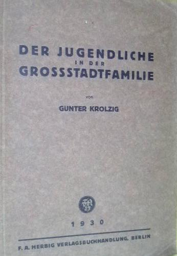 Untersuchung der Deutschen Akademie für soziale und pädagogische Frauenarbeit